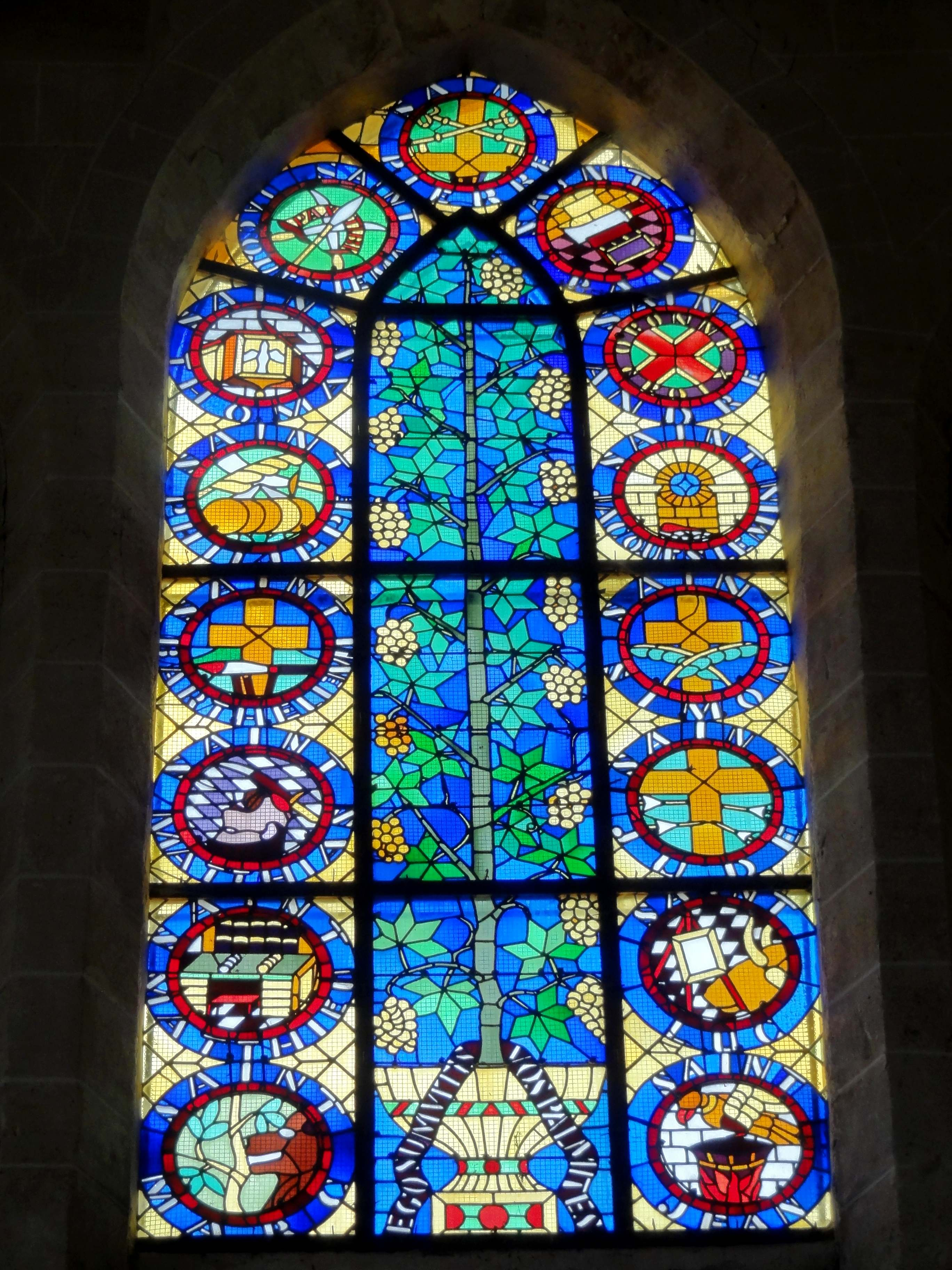 Verrière n° 8 (au sud du croisillon sud), dit vitrail des Apôtres ou de la Vigne, réalisée en 1857 par l'abbé Théodore-Cyrille Deligny (Francières 1808 - Compiègne 1887), curé de Jonquières de 1834 à 1861. Représentation, tympan : saint Pierre. Lancette de gauche, du haut vers le bas : saint Jacques le Majeur, saint Thomas, saint Philippe, saint Barthélémy, saint Matthias, saint Matthieu, saint Marc. Lancette de droite, du haut vers le bas : saint Paul, saint André, saint Jacques le Mineur, saint Simon, saint Jude, saint Luc, saint Jean.